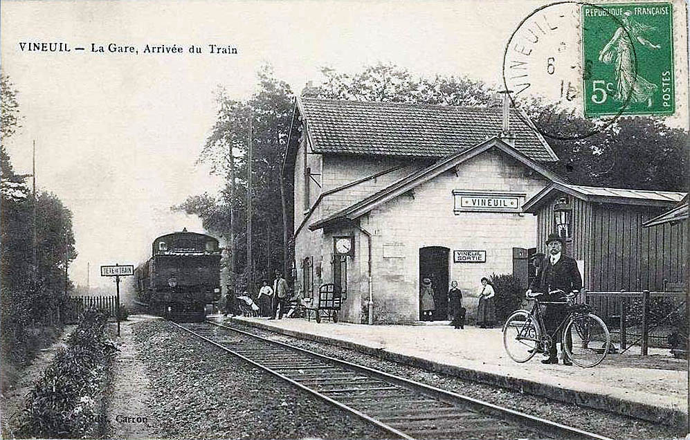 La halte de Vineuil, arrivée du train. Ligne Chantilly-Gouvieux - Crépy-en-Valois, à Vineuil-Saint-Firmin, Oise, France.